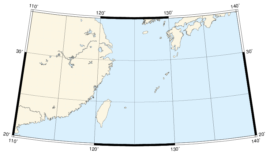 Пример карты в равноугольной конической проекции Ламберта. Стандартные параллели 25 и 45 с.ш.